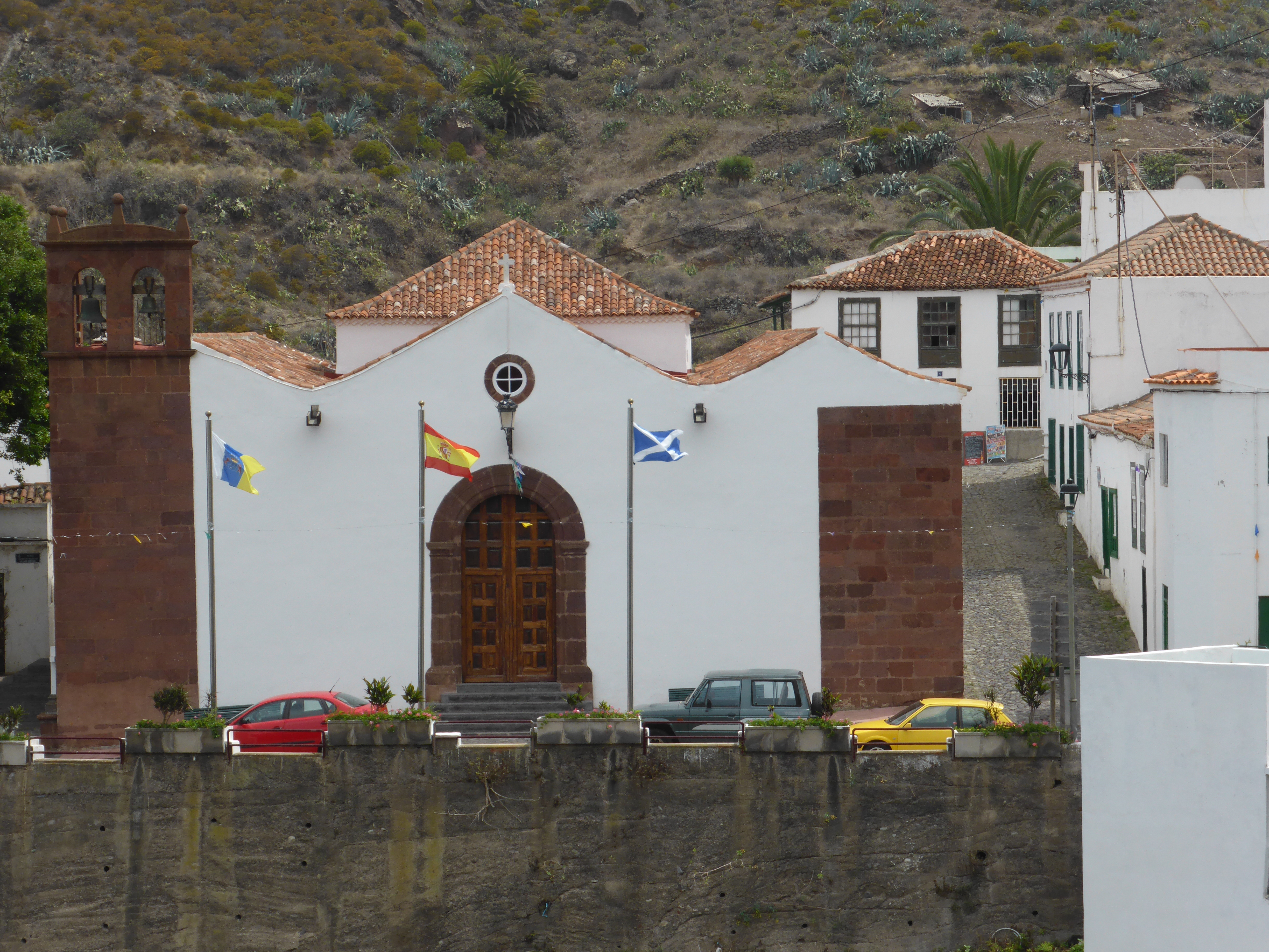 Una de las iglesias más antiguas de la isla de Tenerife. Se empezó a construir a comienzos del siglo XVI, tras la finalización de la Conquista, en época de los cultivos de caña de azúcar. Municipio de Santa Cruz de Tenerife. Taganana forma parte del Parque Rural de Anaga.